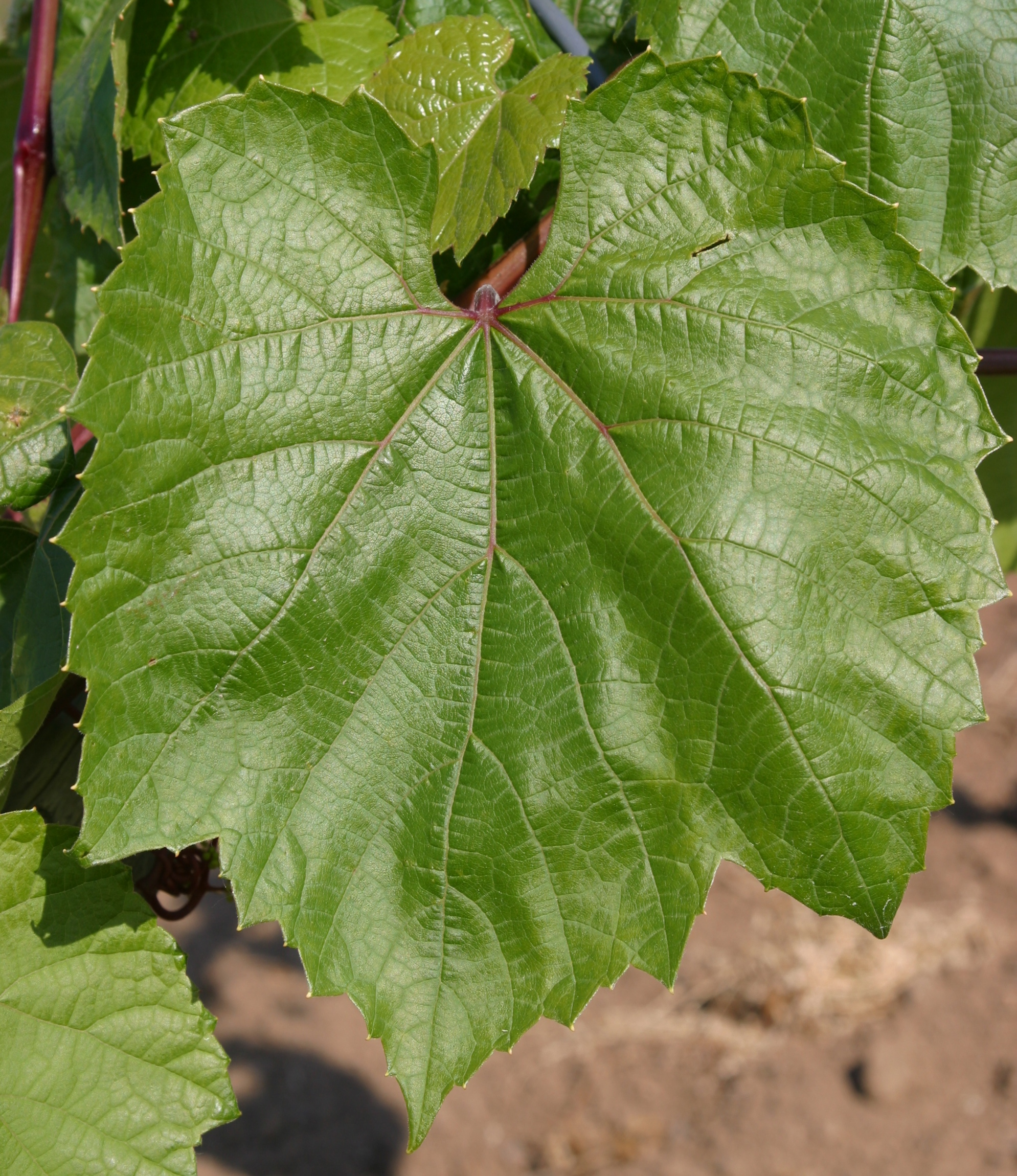 Blatt der Unterlagensorte Kober 5 BB